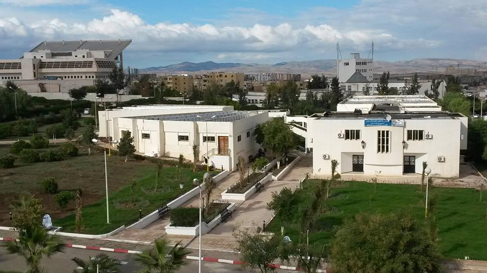 Département des classes préparatoires.